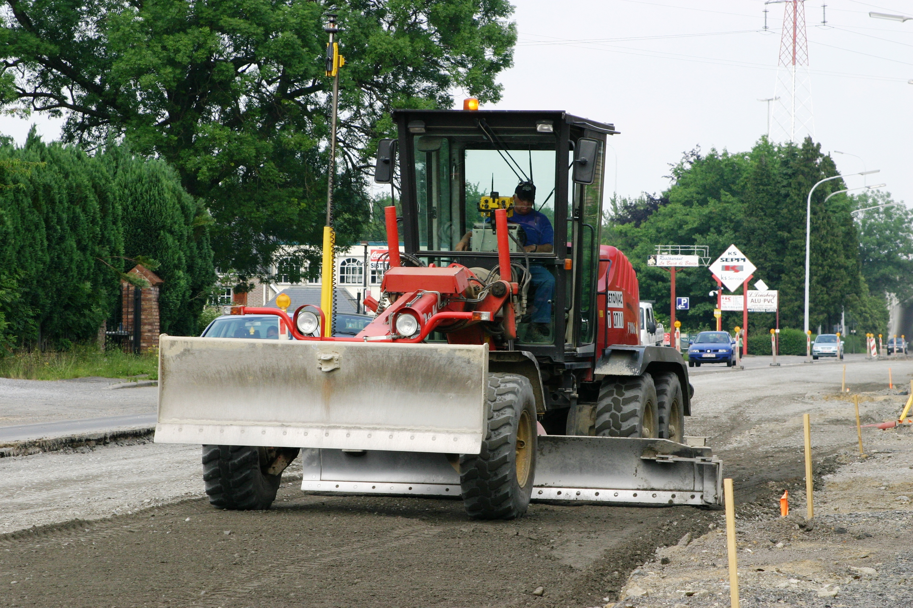 E Grader bei der Aarbecht. Kategorie:Baumaschinnen